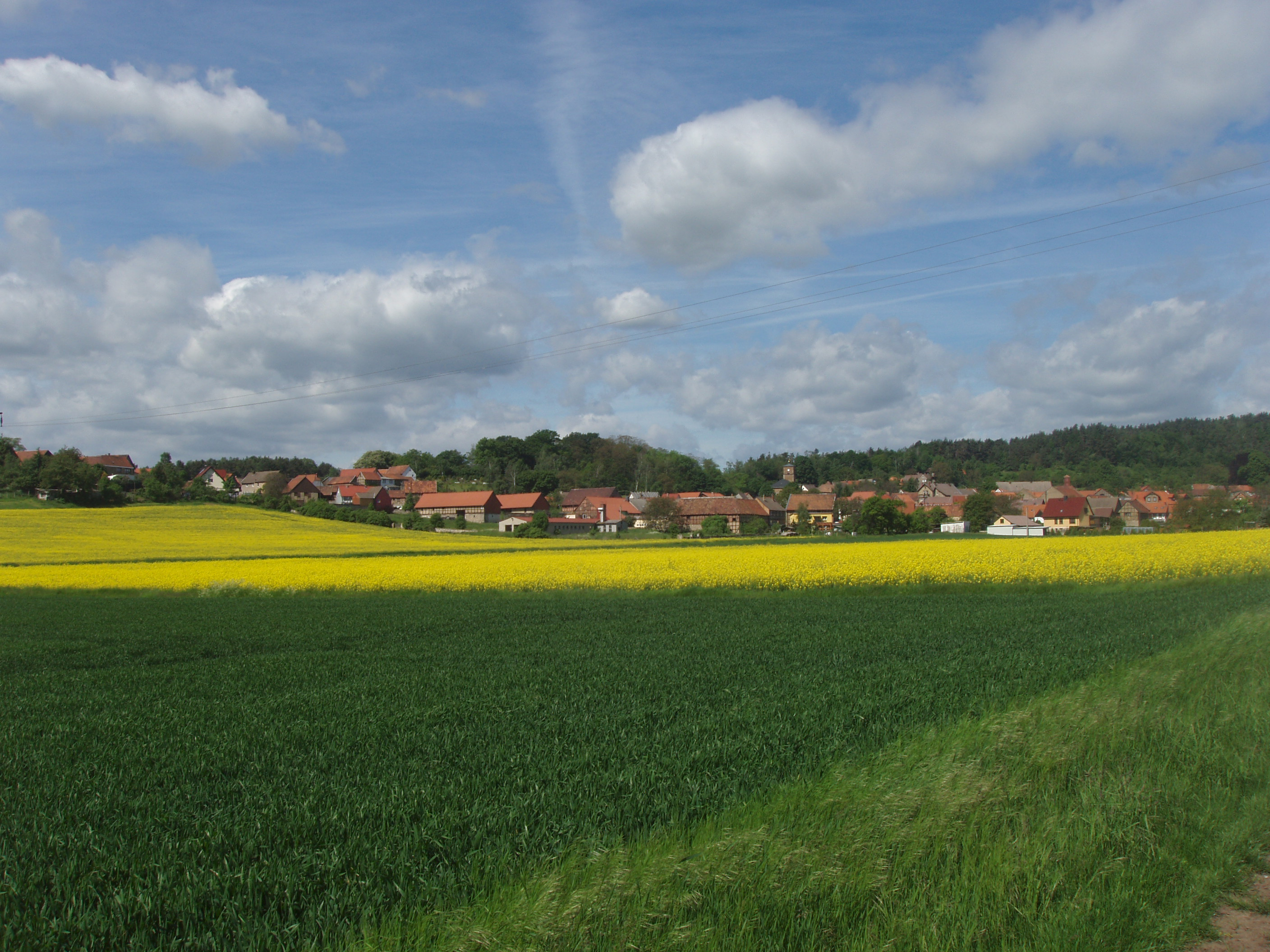 Village Boernecke Germany